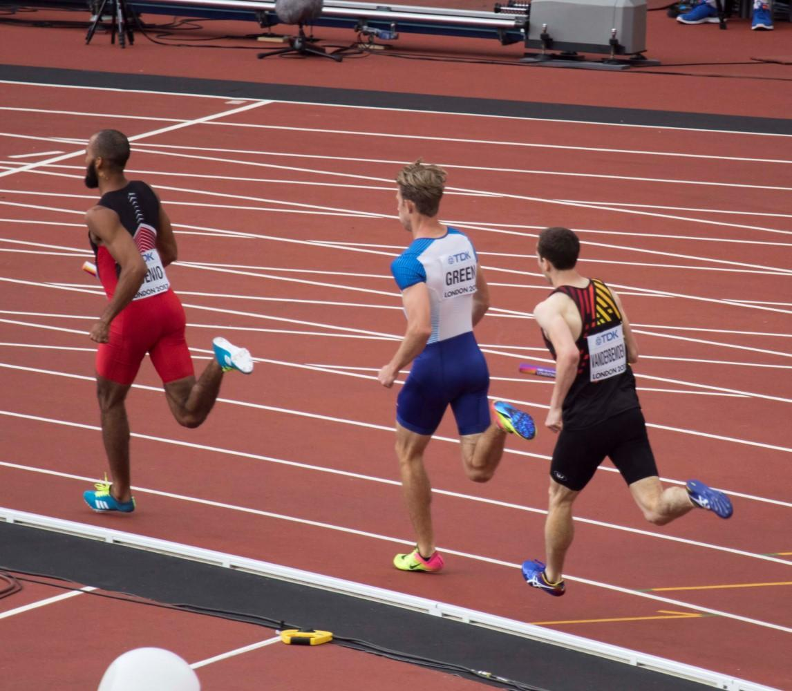 d8_13 4x400m reeksen mannen